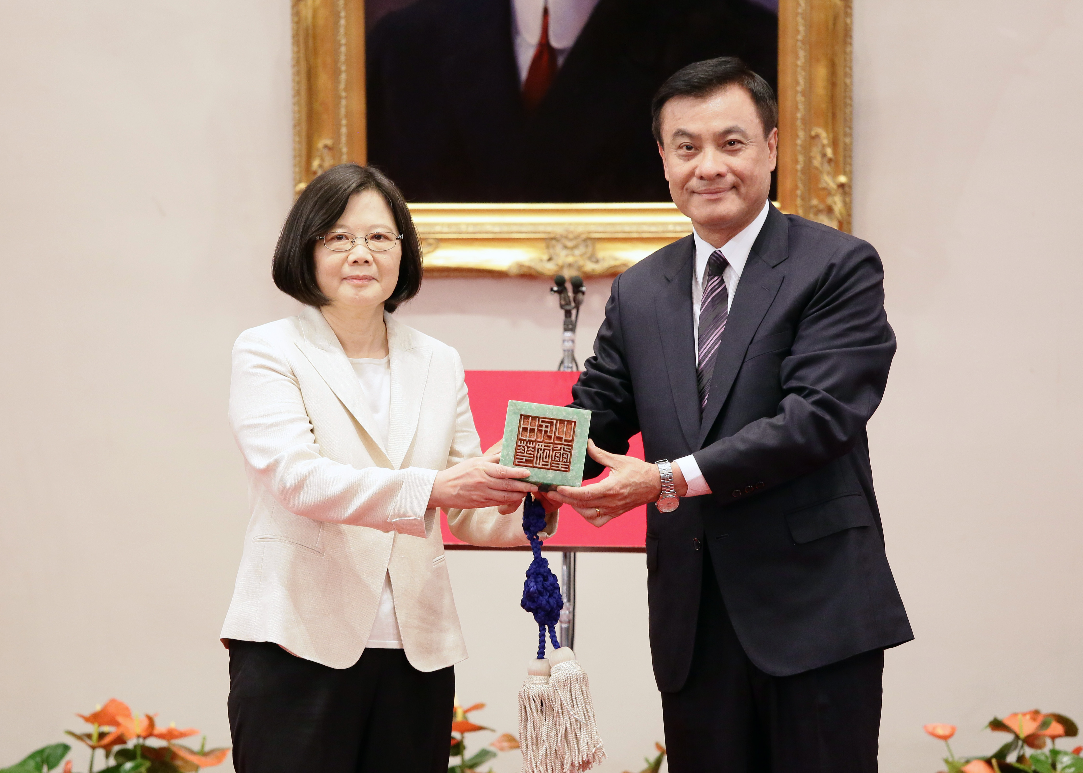 中華民國第十四任總統蔡英文（左）從立法院院長蘇嘉全（右）手中接過中華民國之璽。